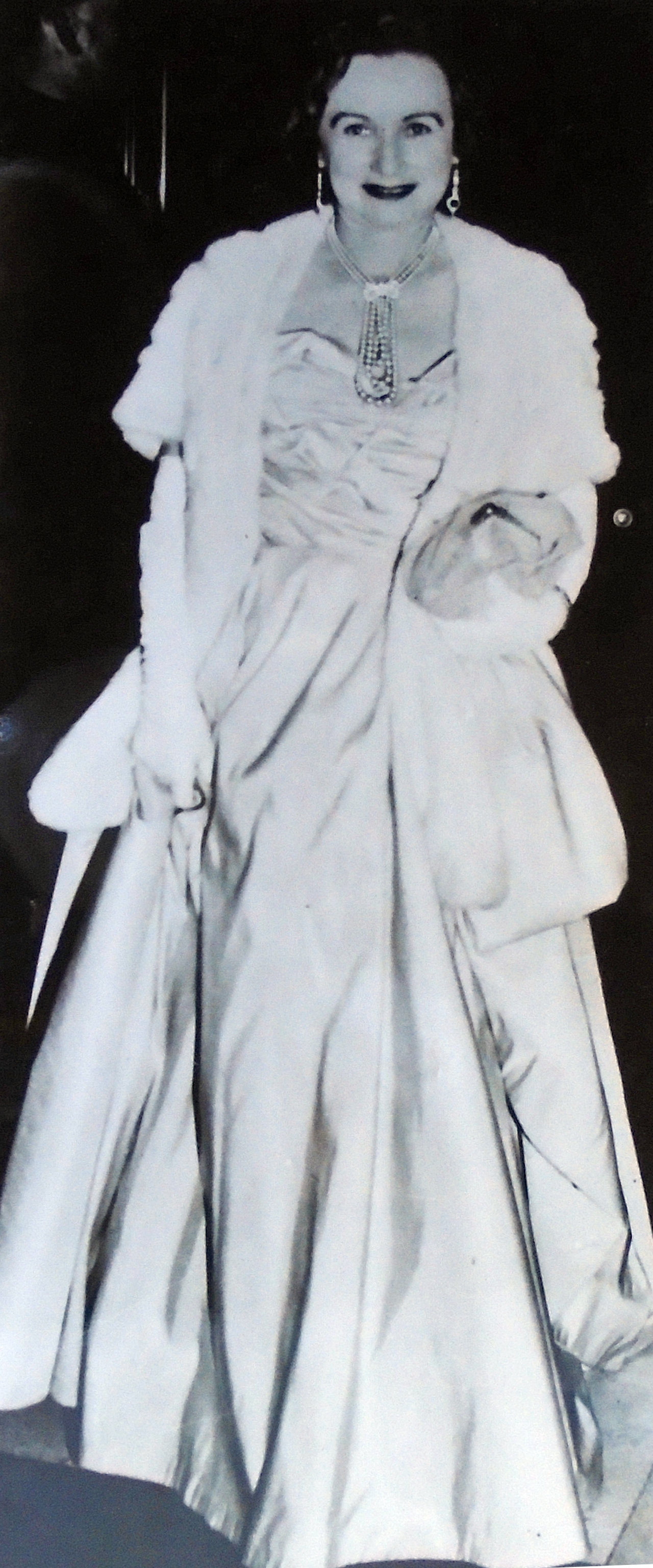 Bertita Harding en una presentación pública